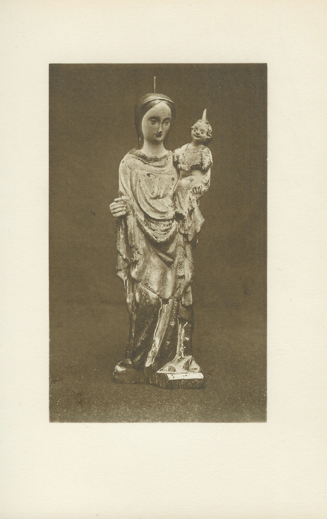 Uit Maria's Heerlijkheid in Nederland van pater Kronenburg ca. 1900